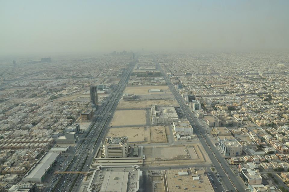 Blick auf Riad vom Burj al-Mamlaka/Kingdom Tower